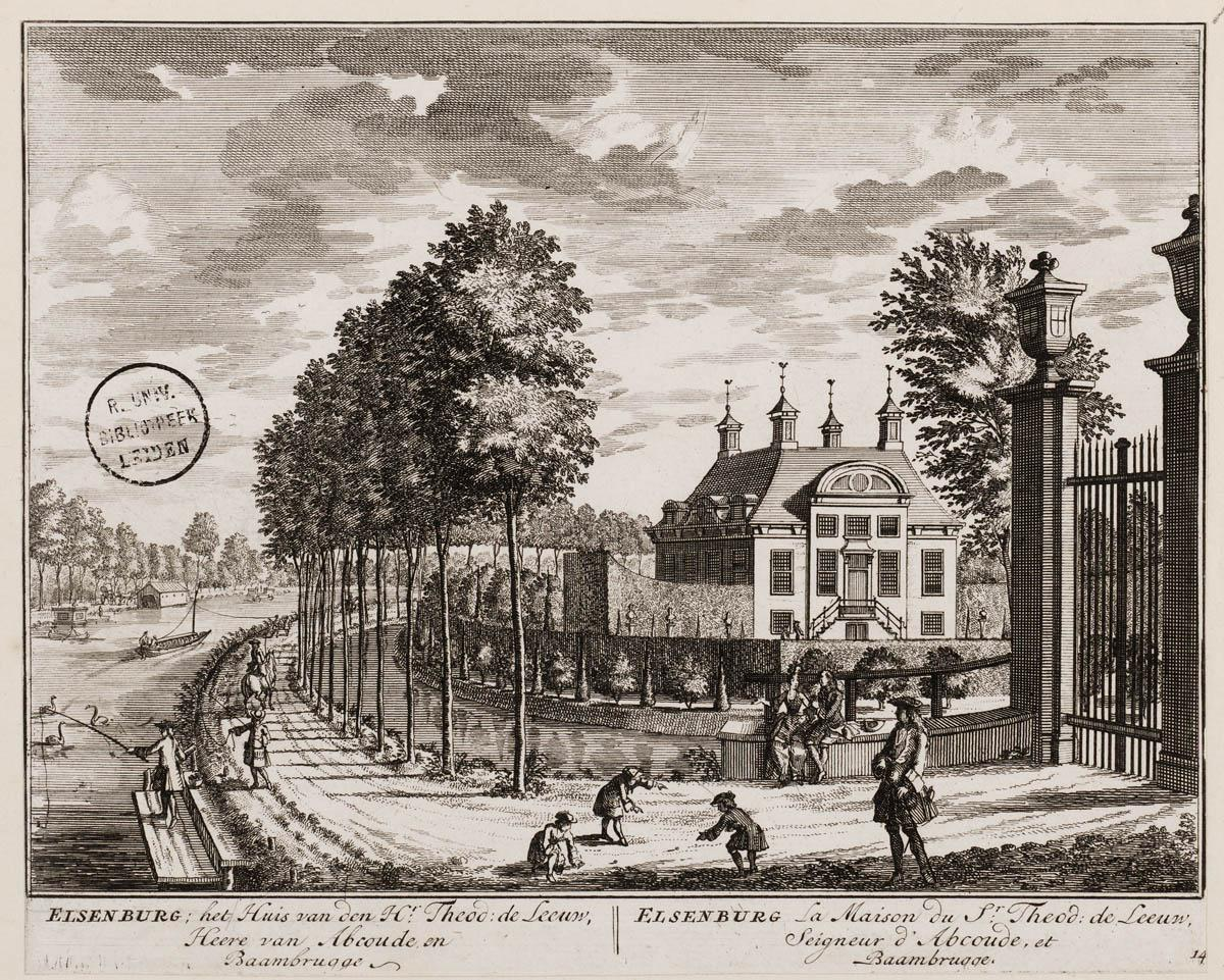 De buitenplaats Elsenburg langs de rivier de Vecht bij het Nederlandse dorp Maarssen in 1719.